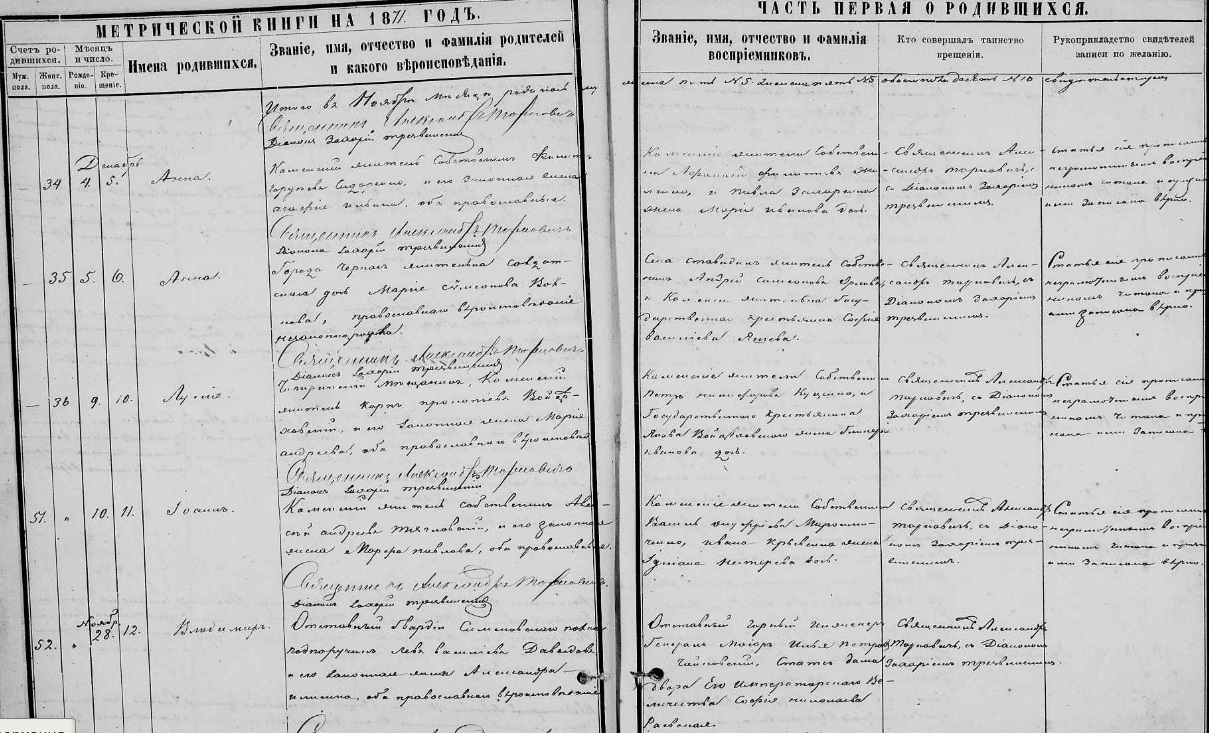 Метрическая запись о рождении Владимира Львовича Давыдовы.